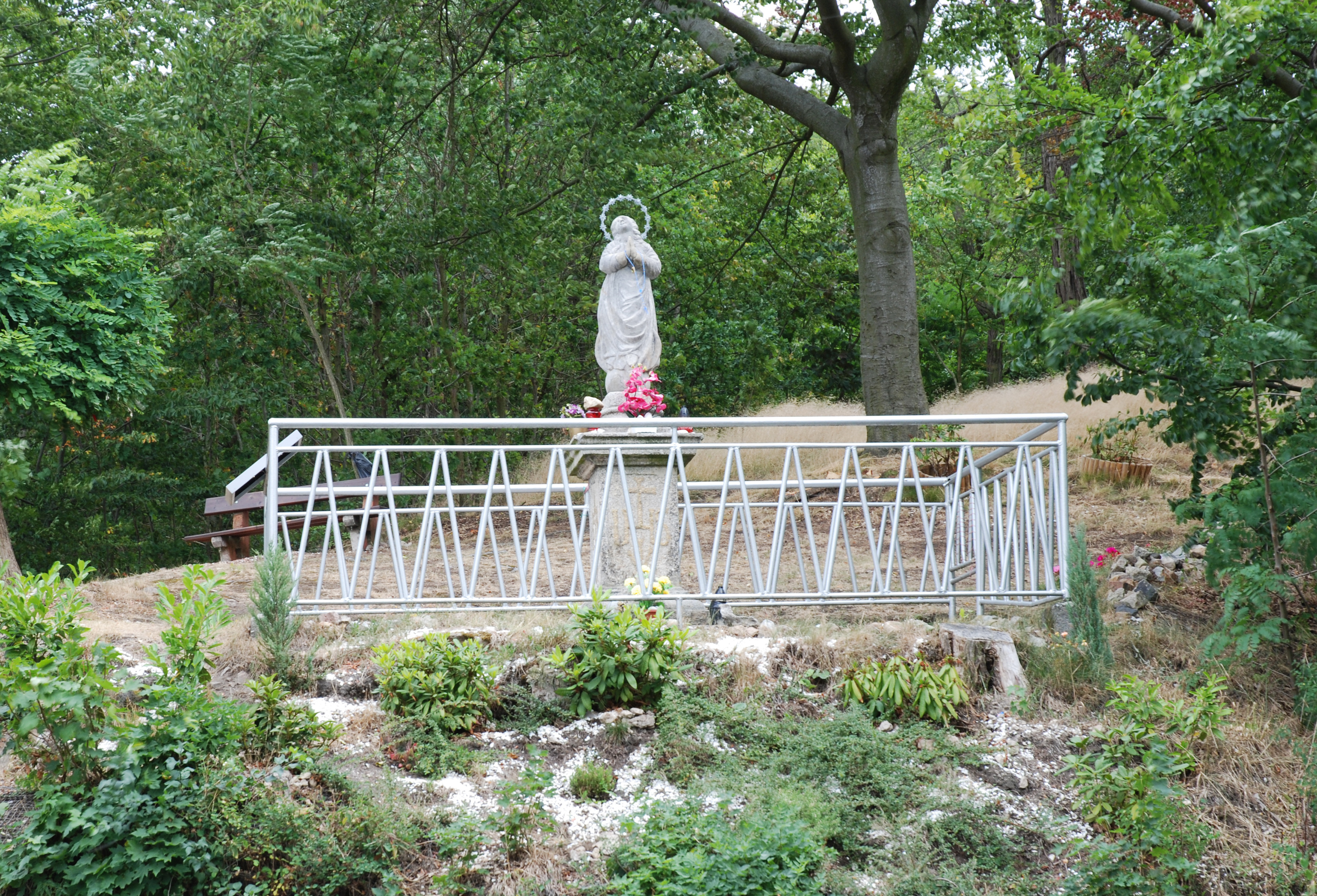 Socha Panny Marie Neposkvrněného početí v Karlových Varech-Drahovicích